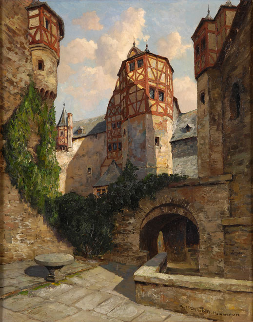 Burg Eltz, Öl auf Leinwand, 82 x 65 cm